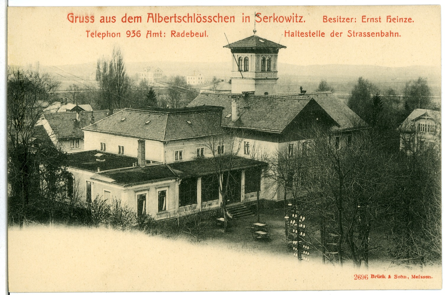 Serkowitz; Albertschlößchen This postcard is from publisher Brück & Sohn in Meißen ( postcard has a unique number 02696 and is available in a higher resolution at the publisher. This images was uploaded in a cooperation project between Wikipedians and the publisher.